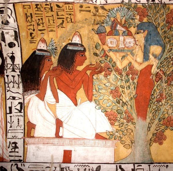 Ēģiptes dieviete - dzīvības koks, kapenes (Sennedjem), Luksora, Ēģipte.